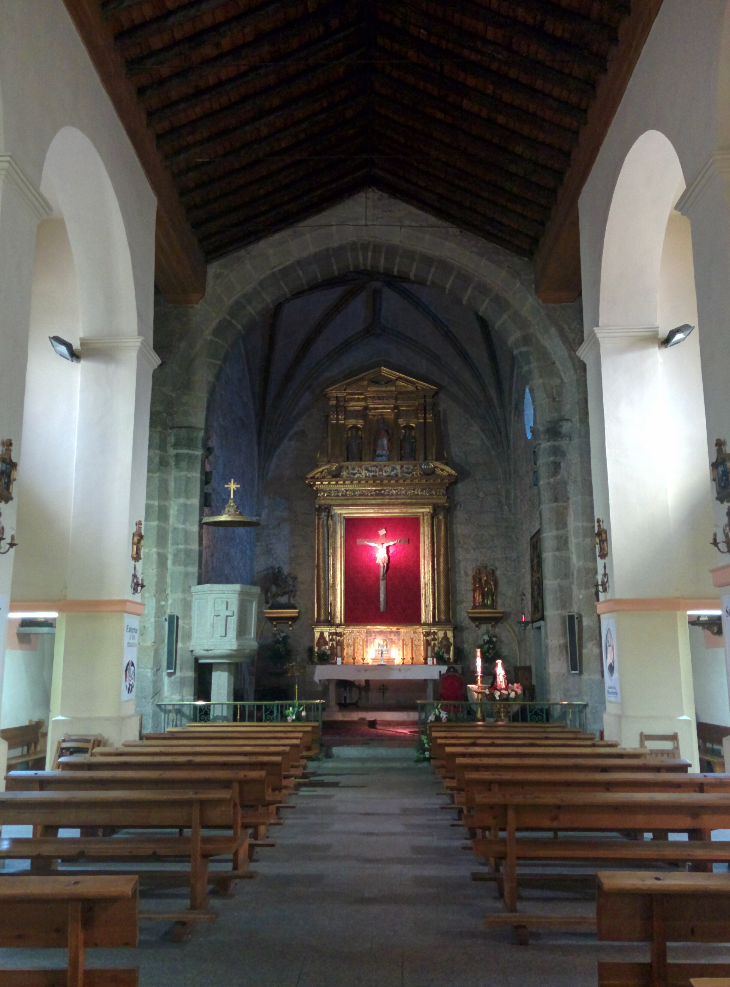 Interior de la iglesia de Santiago Apóstol, en Colmenarejo (Madrid, España).